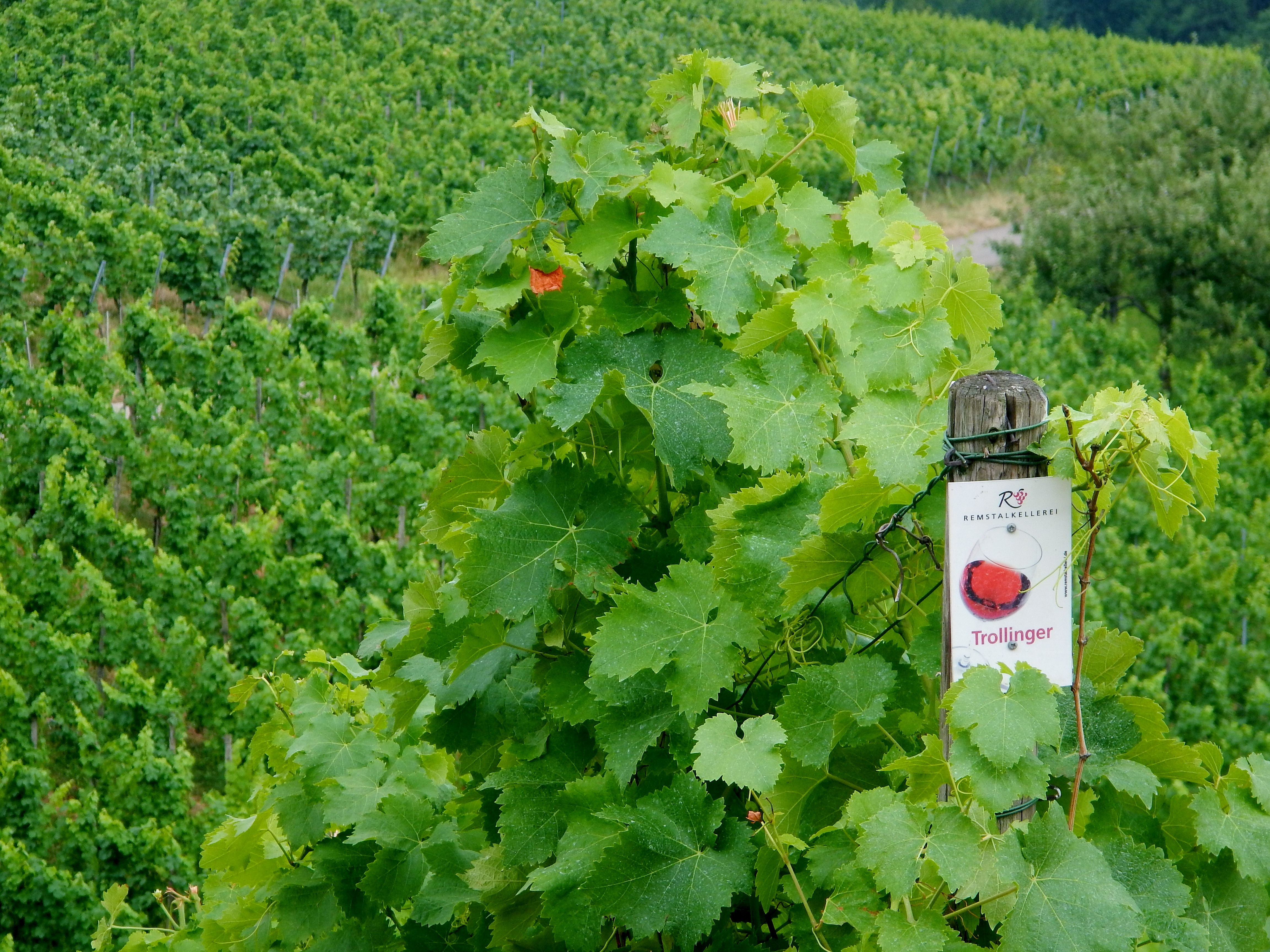 Trollinger